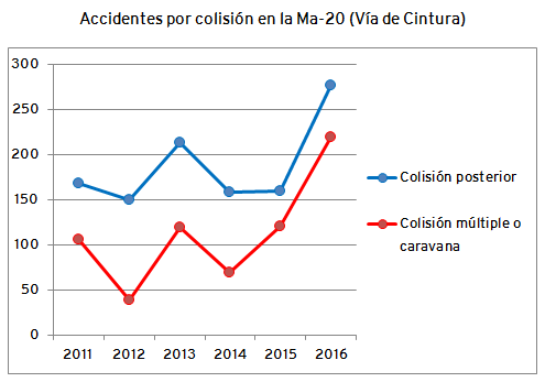 Gráfica que describe las colisiones en la Ma-20 en el ejercicio 2011-2016. Fuente: «La Via de Cintura, saturada». IB3 Notícies Migdia. Episodio 1232-m. Islas Baleares: IB3. 25/06/2017. min. 05:50.